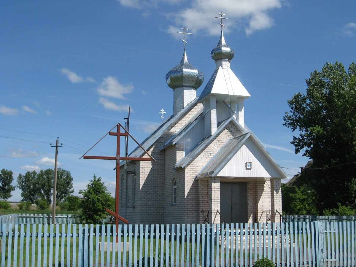 Пясочнае. Царква